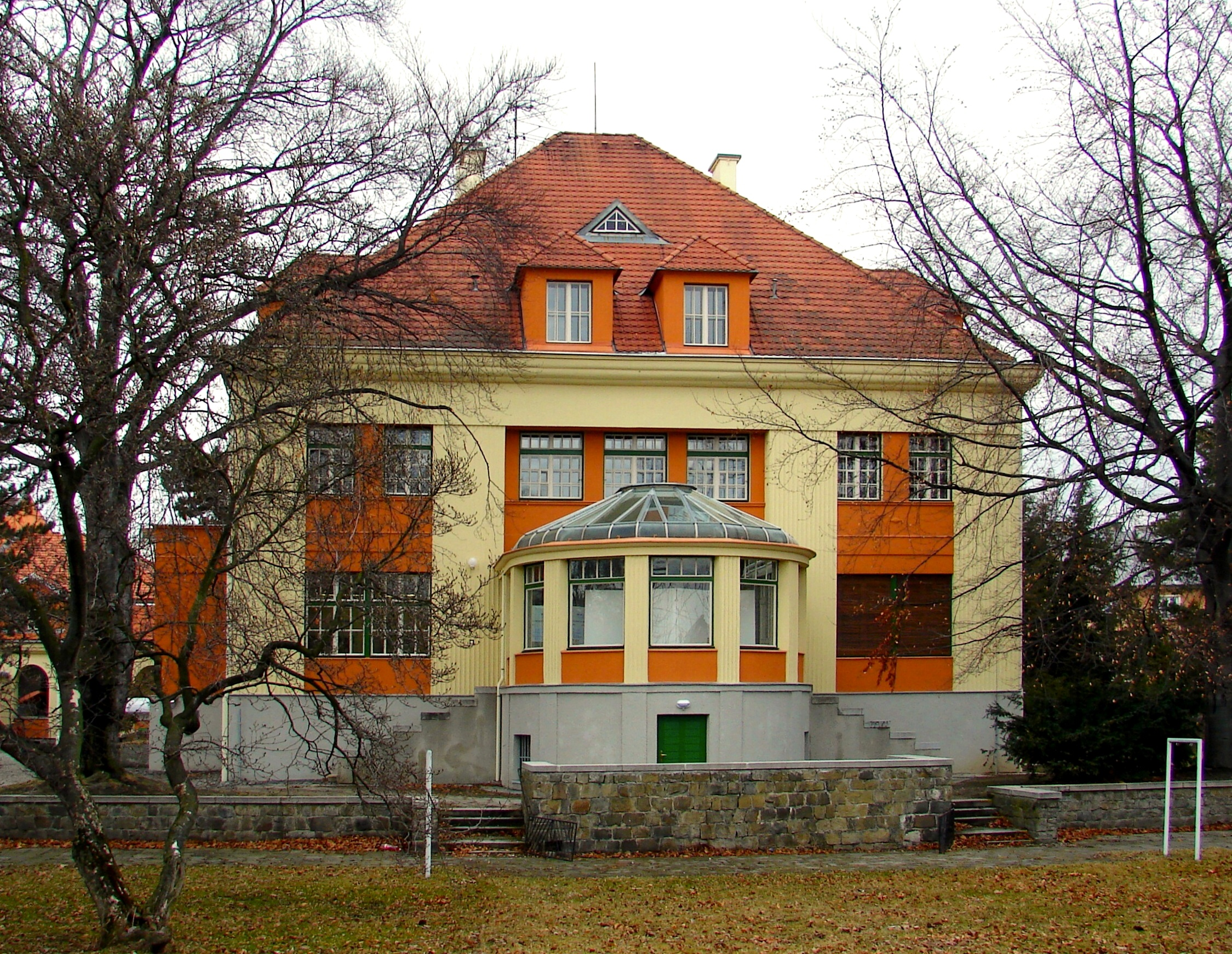 Vila (Krnov), Hlubčická 152/20